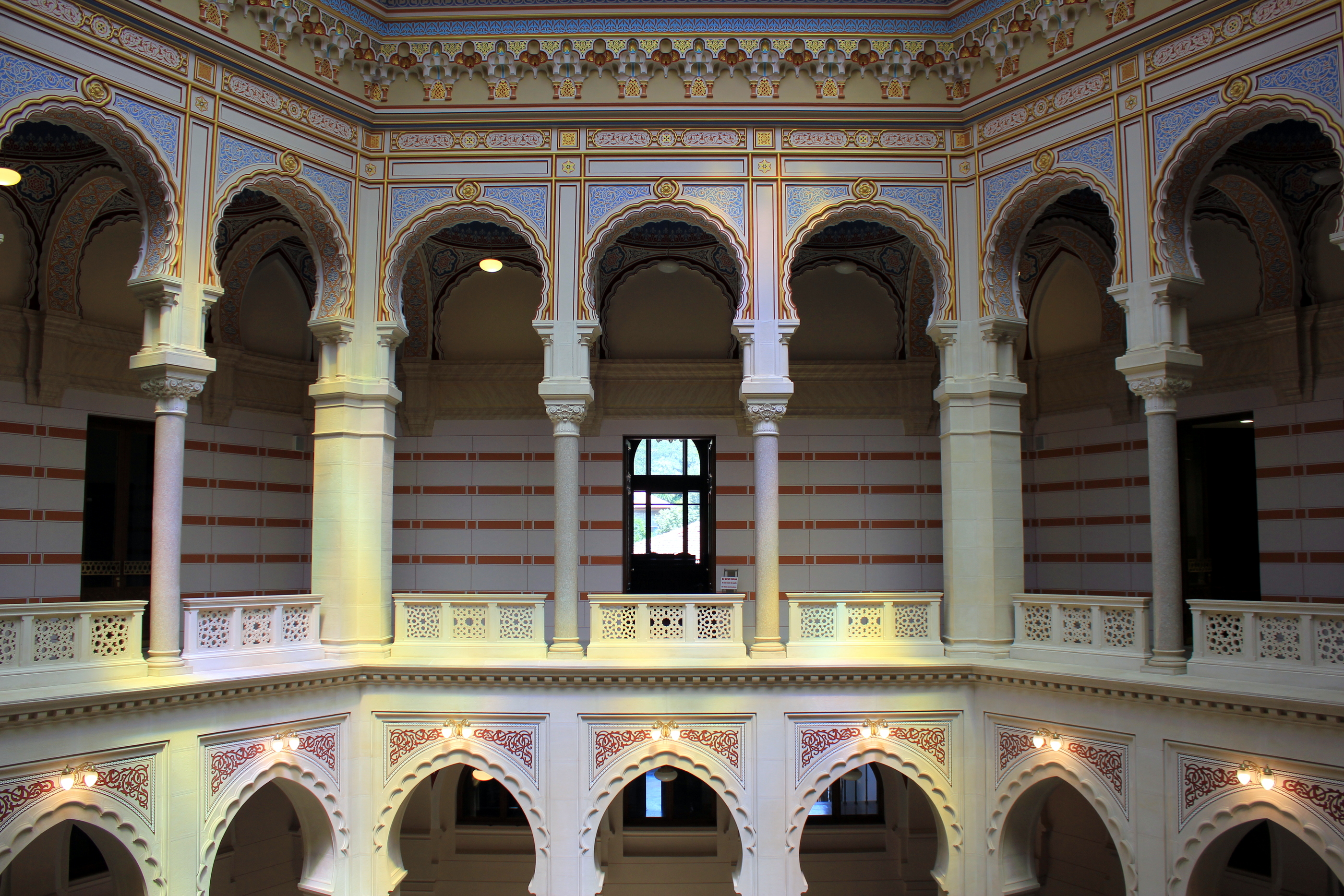 Innenansicht der sanierten Vijećnica in Sarajevo.